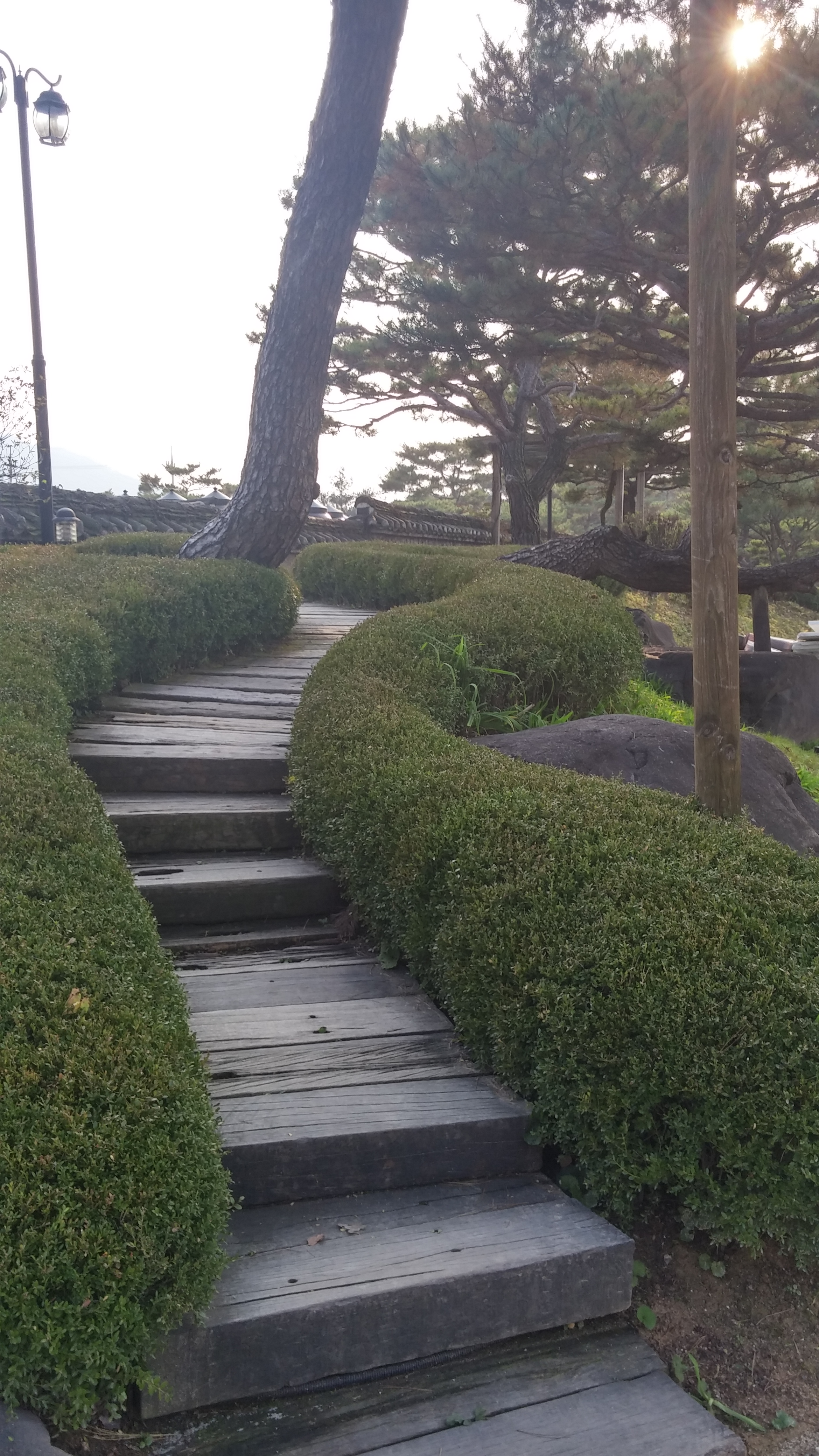 안성 서일농원 (6)